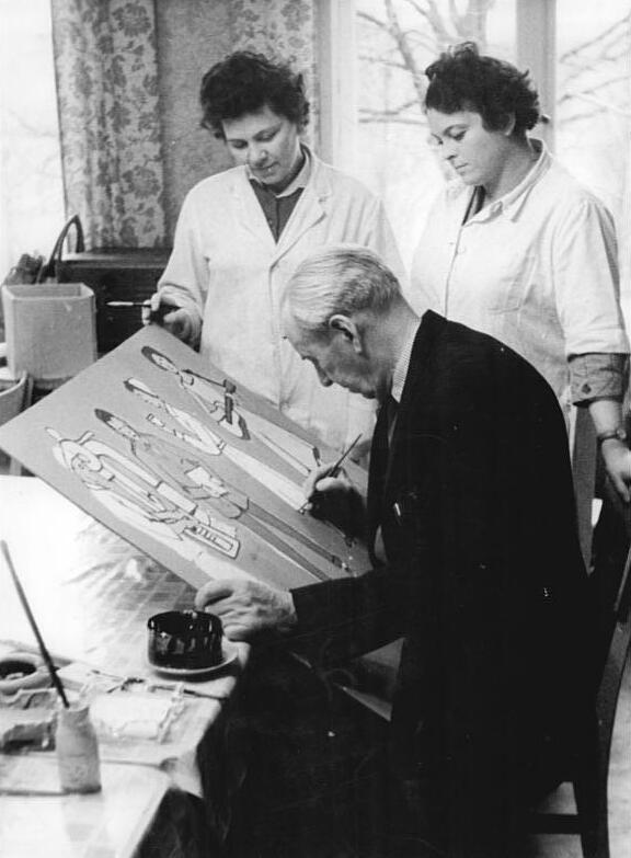 Magdeburg, Mitglieder eines Malzirkels Zentralbild Biscan 3.3.1961 Vorbereitung der III. Arbeiterfestspiele. Laienkünstler arbeiten an den Wettbewerbs-Entwürfen. Wie ungezählte andere Laienkünstler bereiten sich auch die Mitglieder des Malzirkels der Öl- und Fettwerke in Magdeburg auf den Wettbewerb vor, der zu den III. Arbeiterfestspielen in Magdeburg ausgetragen wird. Sie werden die Entwürfe für zwei dekorative Wandmalerein einreichen. Die Jugendlichen des Zirkels haben dabei das Thema "Freudig lernt die Jugend - ihr gehört die Zukunft" gewählt, die zweite Gruppe wählte das Thema "Sozialistische arbeiten, lernen und leben." Die Laienkünstler werden dabei von dem Maler Moritz Rusche betreut und angeleitet. UBz: Der Maler Moritz Rusche erklärt den Zirkelteilnehmerinnen Anneliese Pfeil (links), Sachbearbeiterin, und Gerda Menz, Laborleiterin, wie sie die Figuren darstellen müssen.